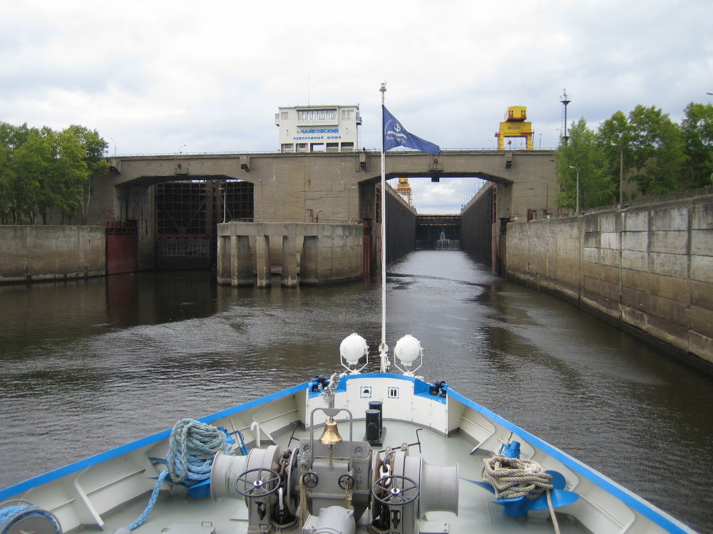 Чайковский, шлюз (06.09.05)